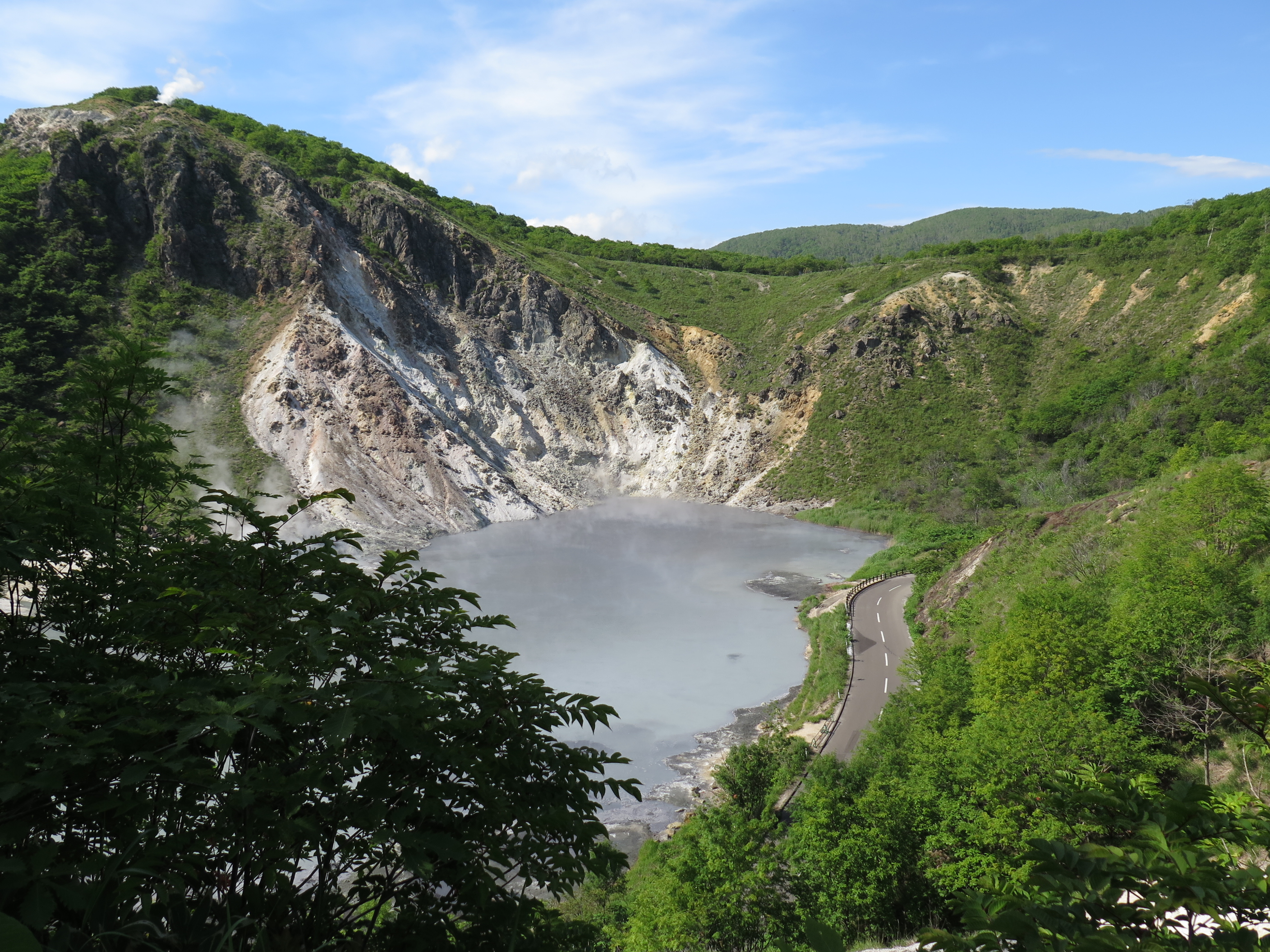 日和山と大湯沼（北海道登別市）